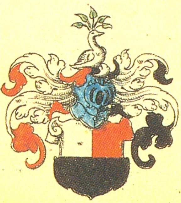 Wappen derer von Witteren